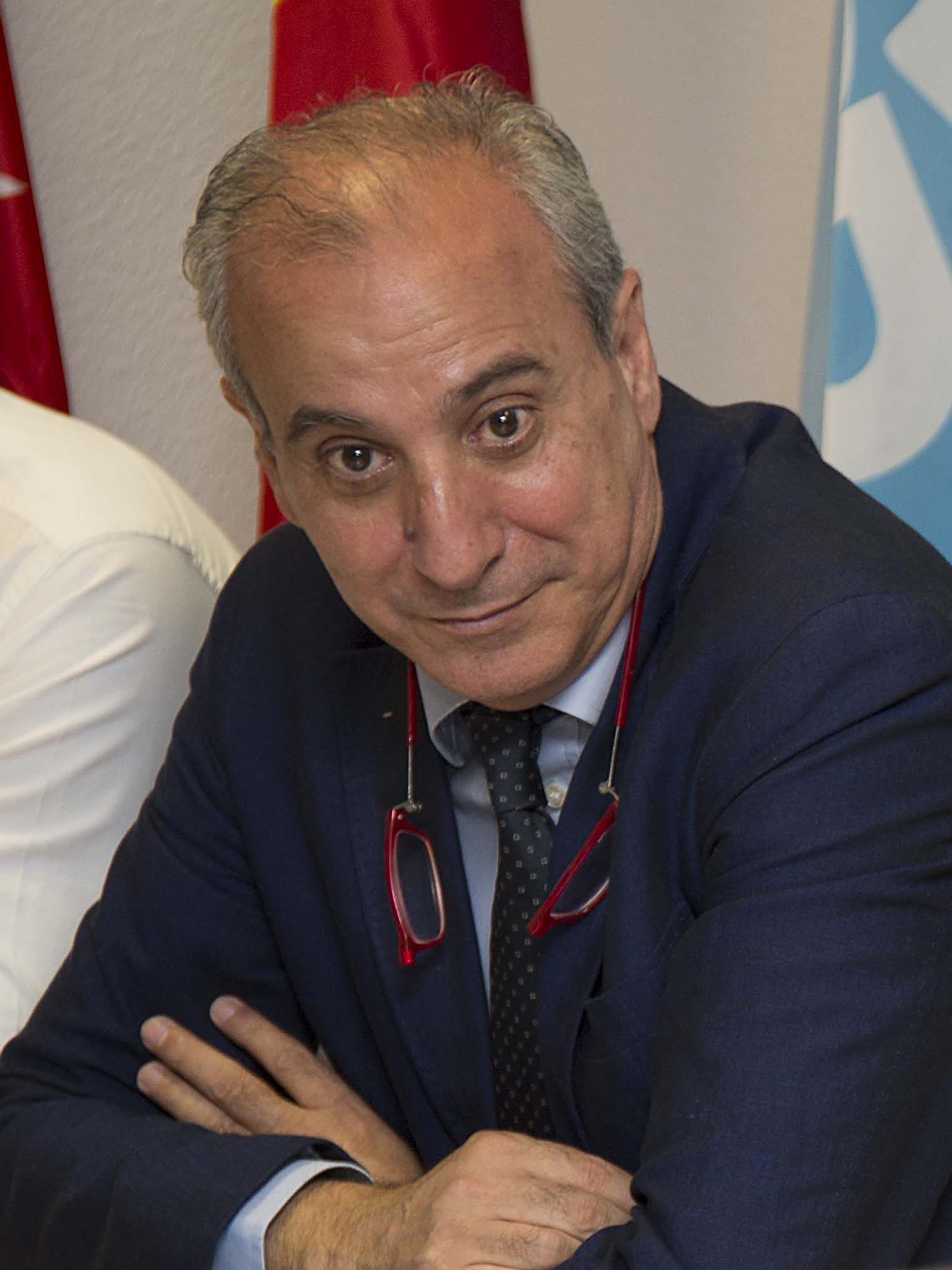 Reunión Gestora del PP Madrid presidida por Cristina Cifuentes el 12/07/2016